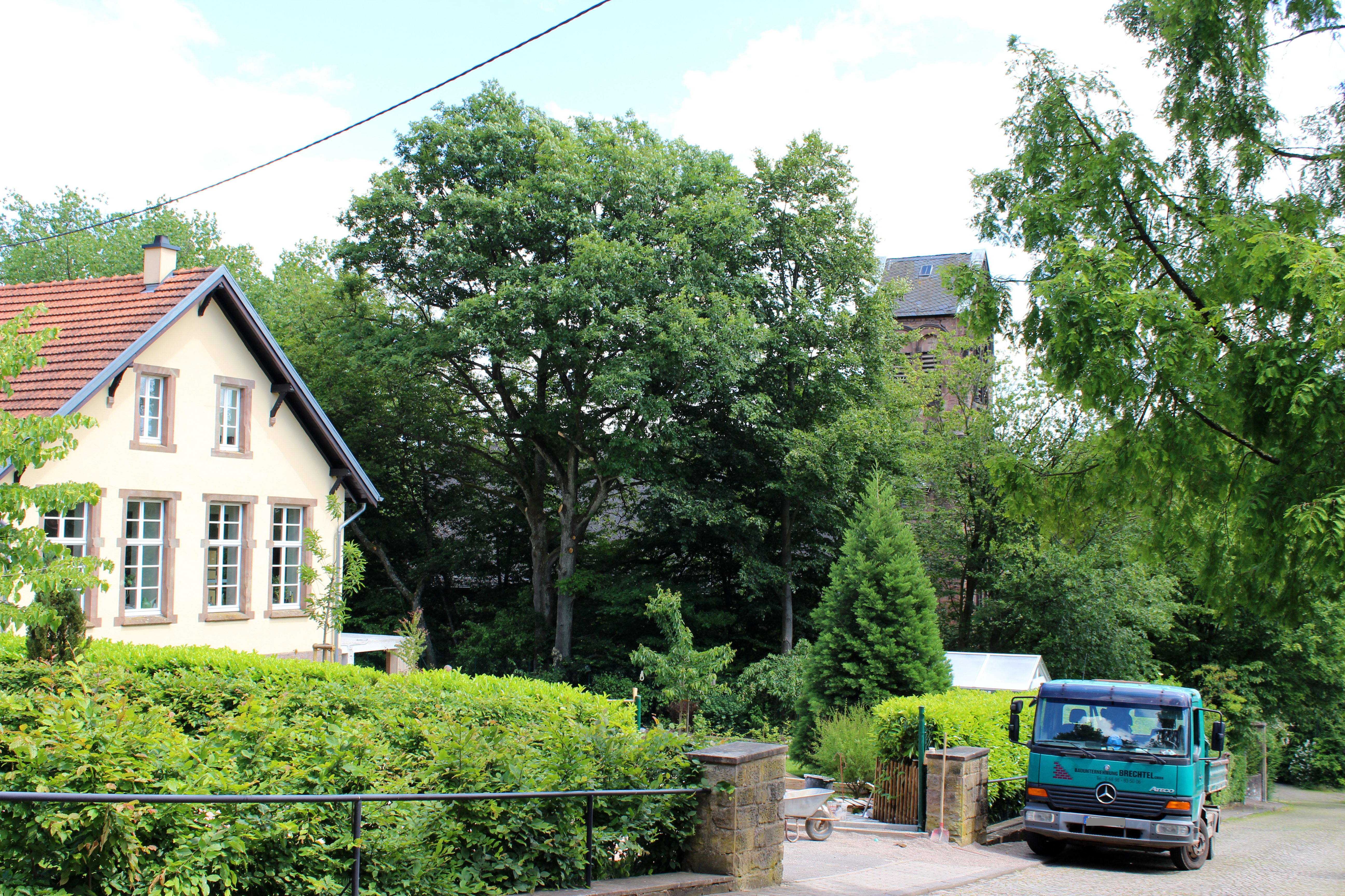 Maybach, Stadt Friedrichsthal, Saarland